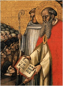 detail